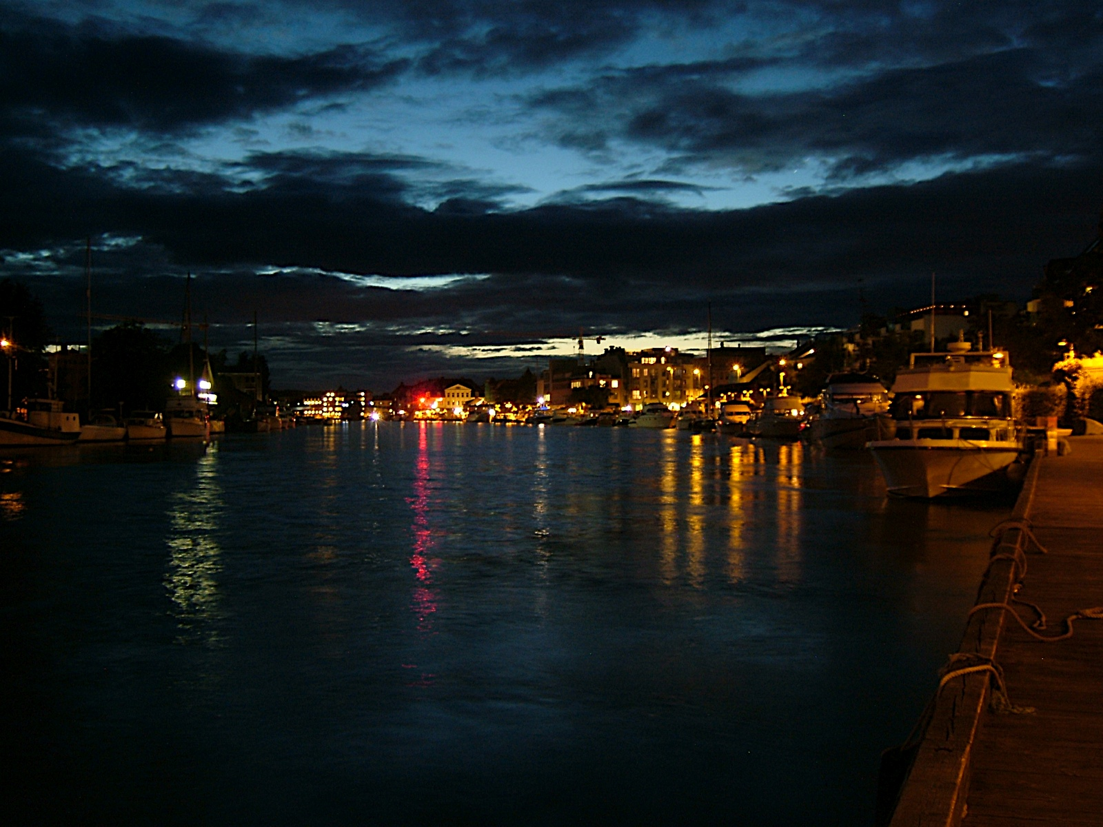 Fredrikstad